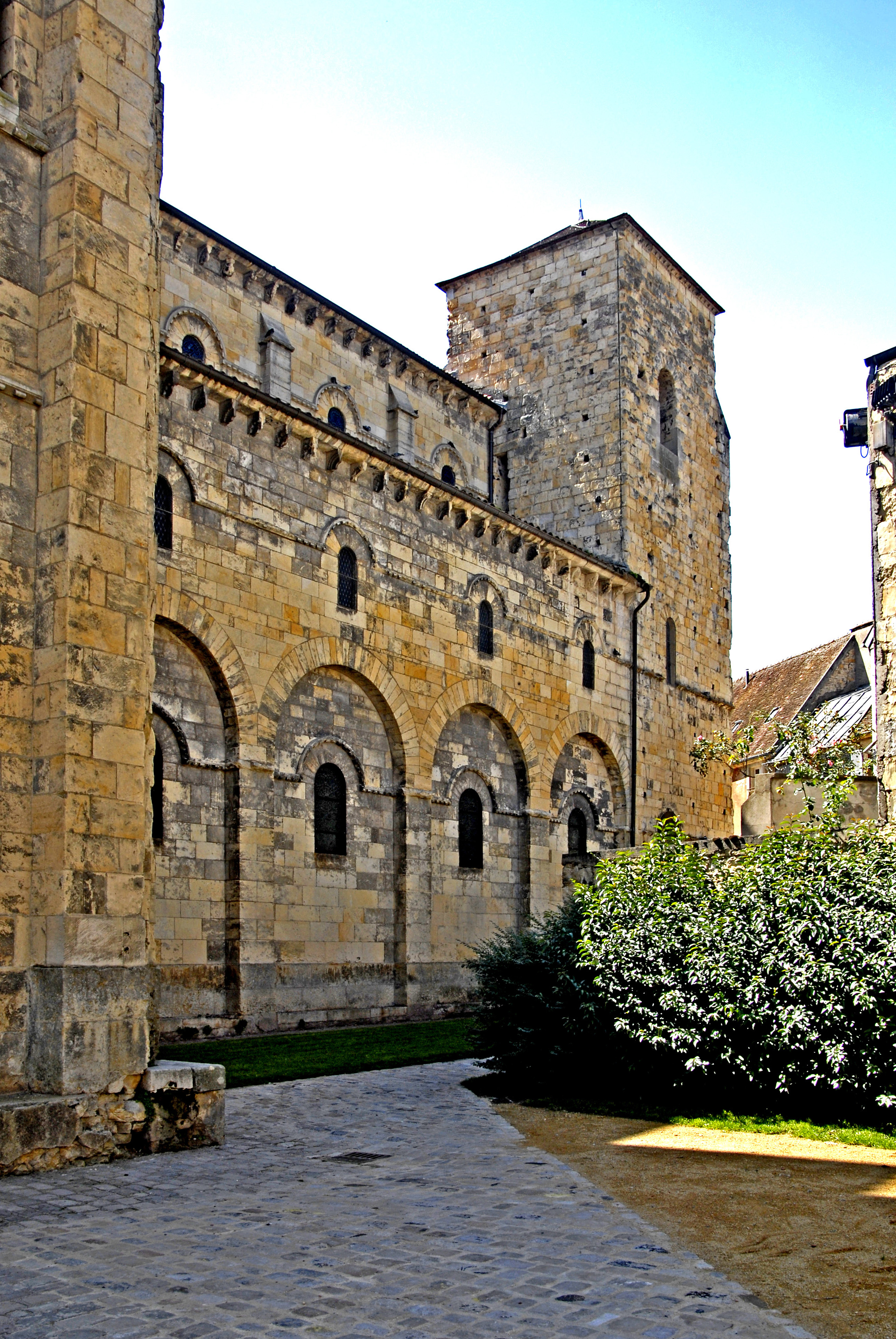 St.-Etienne Nevers, Langhausnordwand